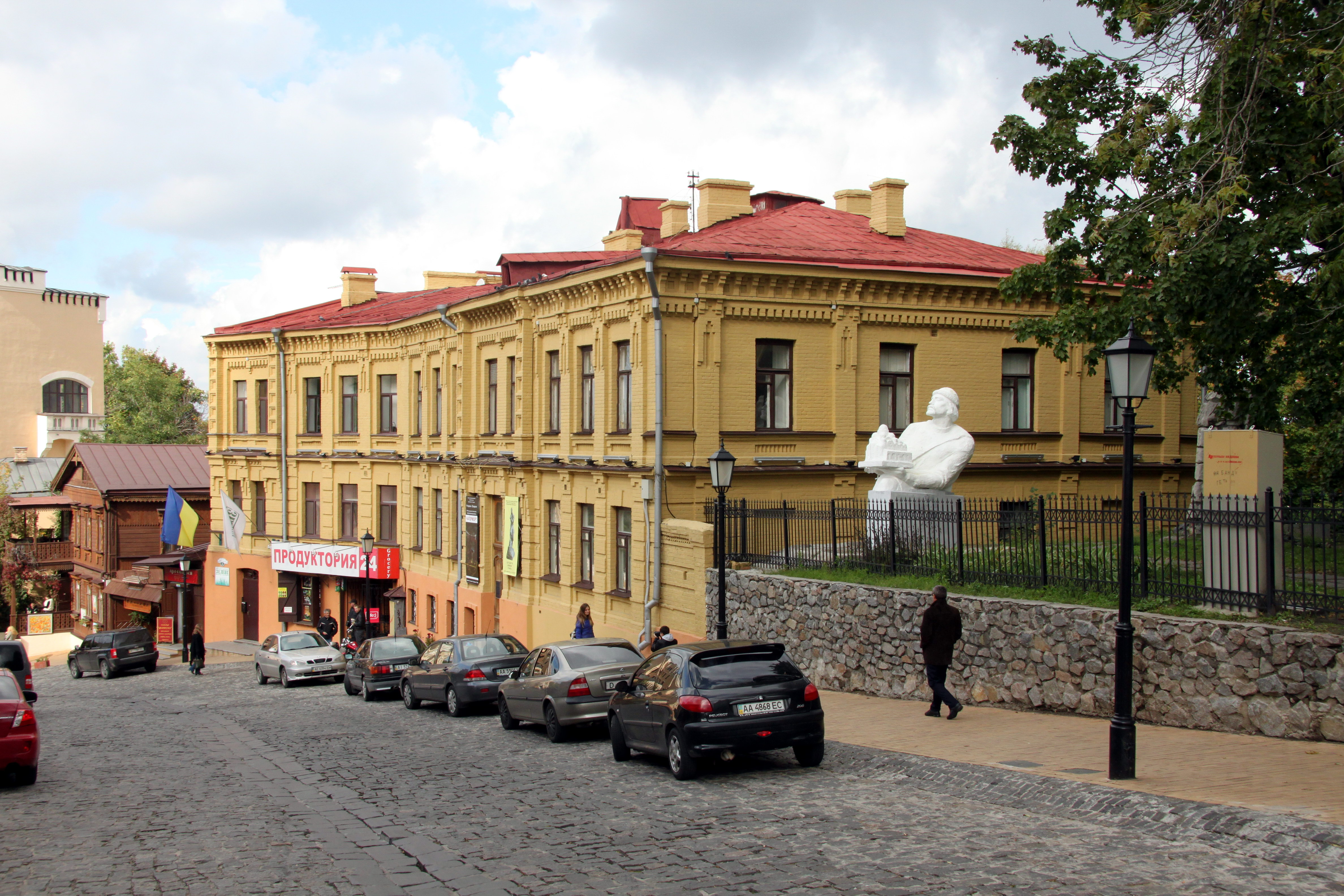 Будинок житловий священика Андріївської церкви, в якому у 1911 році містилась майстерня І. П. Кавалерідзе, скульптора; у 1910-х рр. проживав Ф. І. Титов, історик, настоятель Андріївської церкви, Київ, Андріївський узвіз, 21